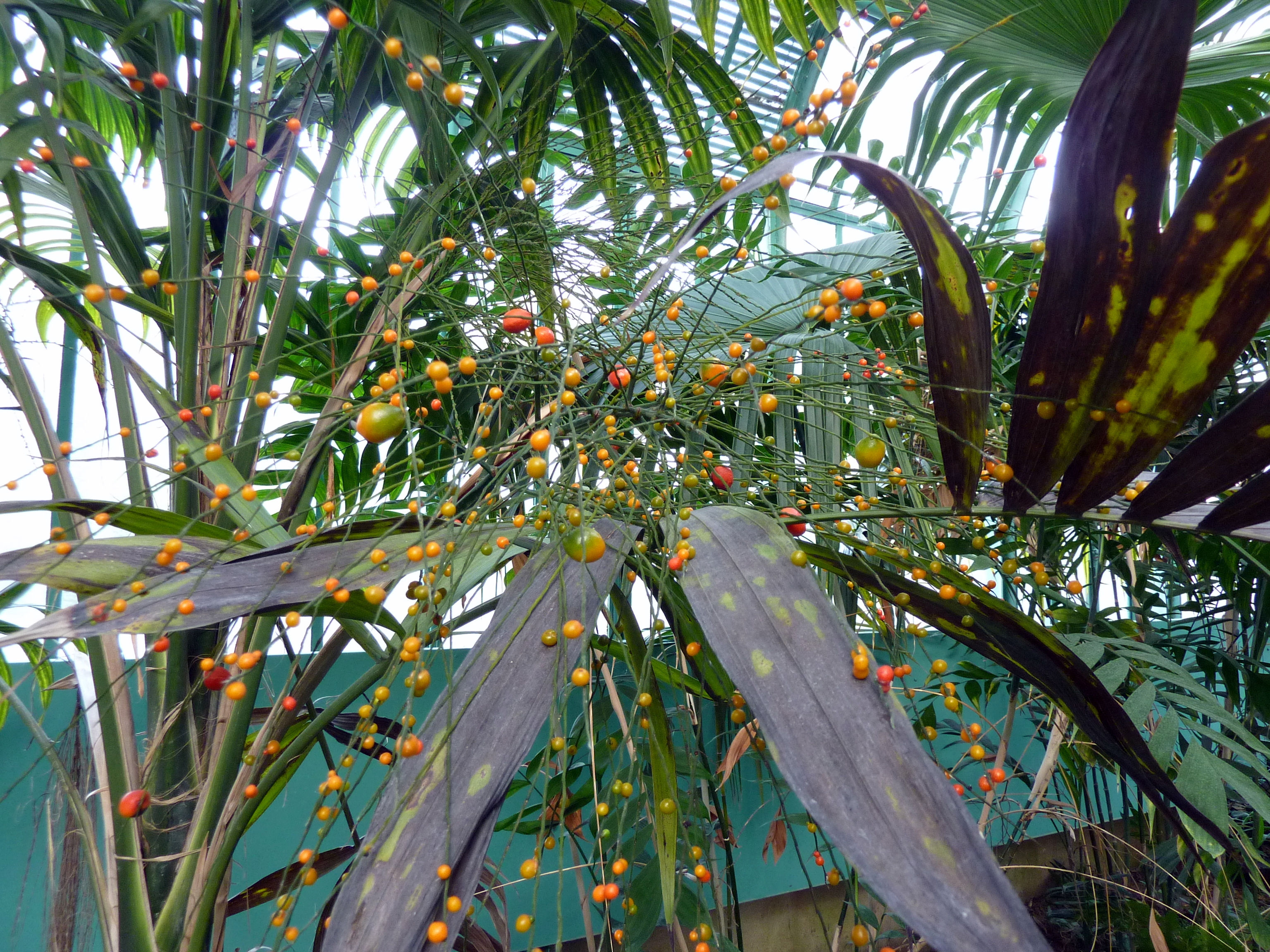 Synechanthus fibrosus, photo prise au jardin des Serres d'Auteuil (Paris)